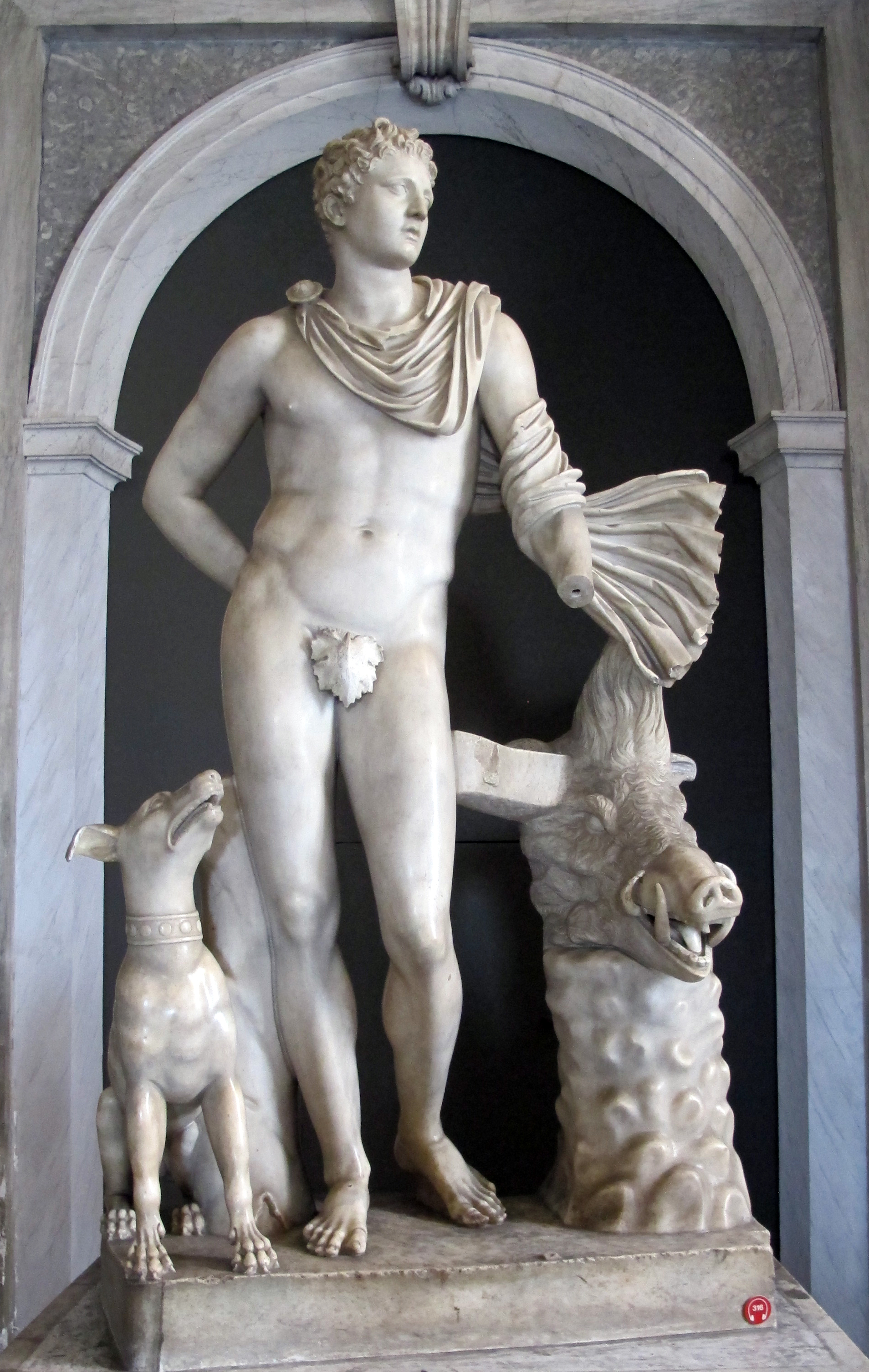 Arte romana nei Musei Vaticani